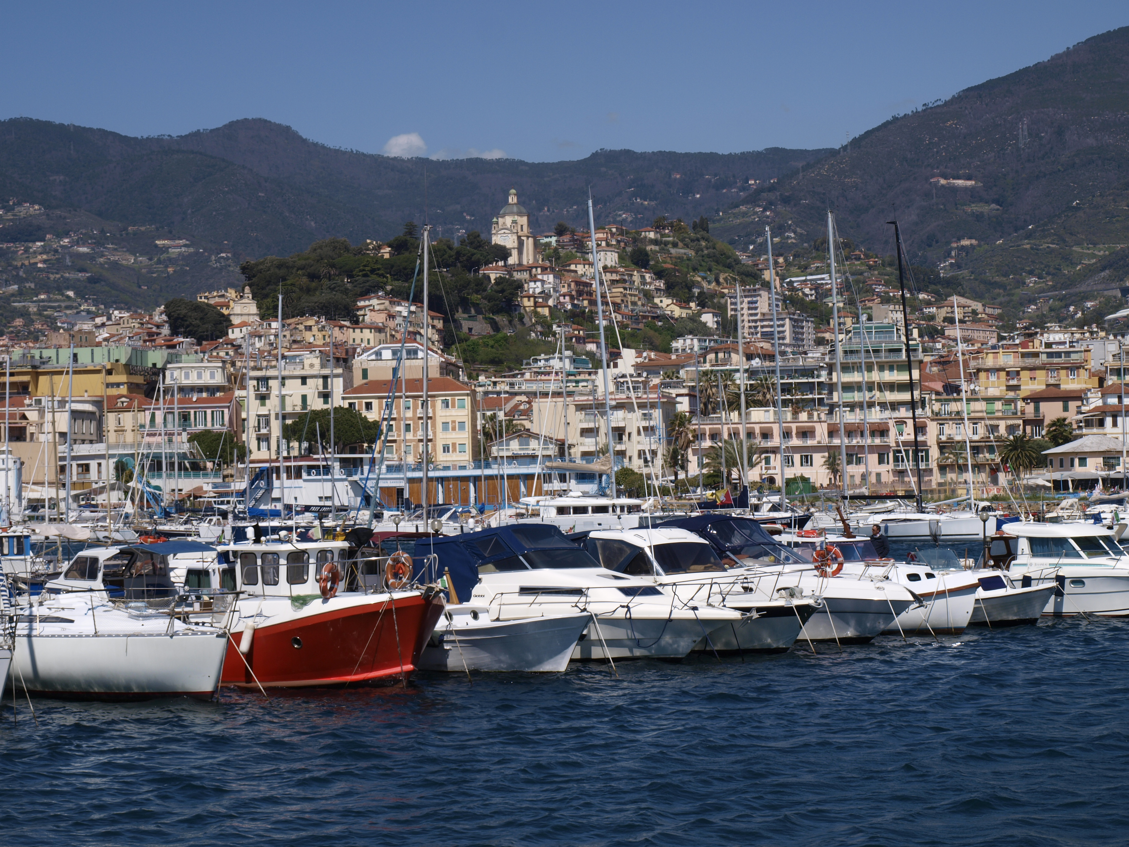 18038 Sanremo IM, Italy